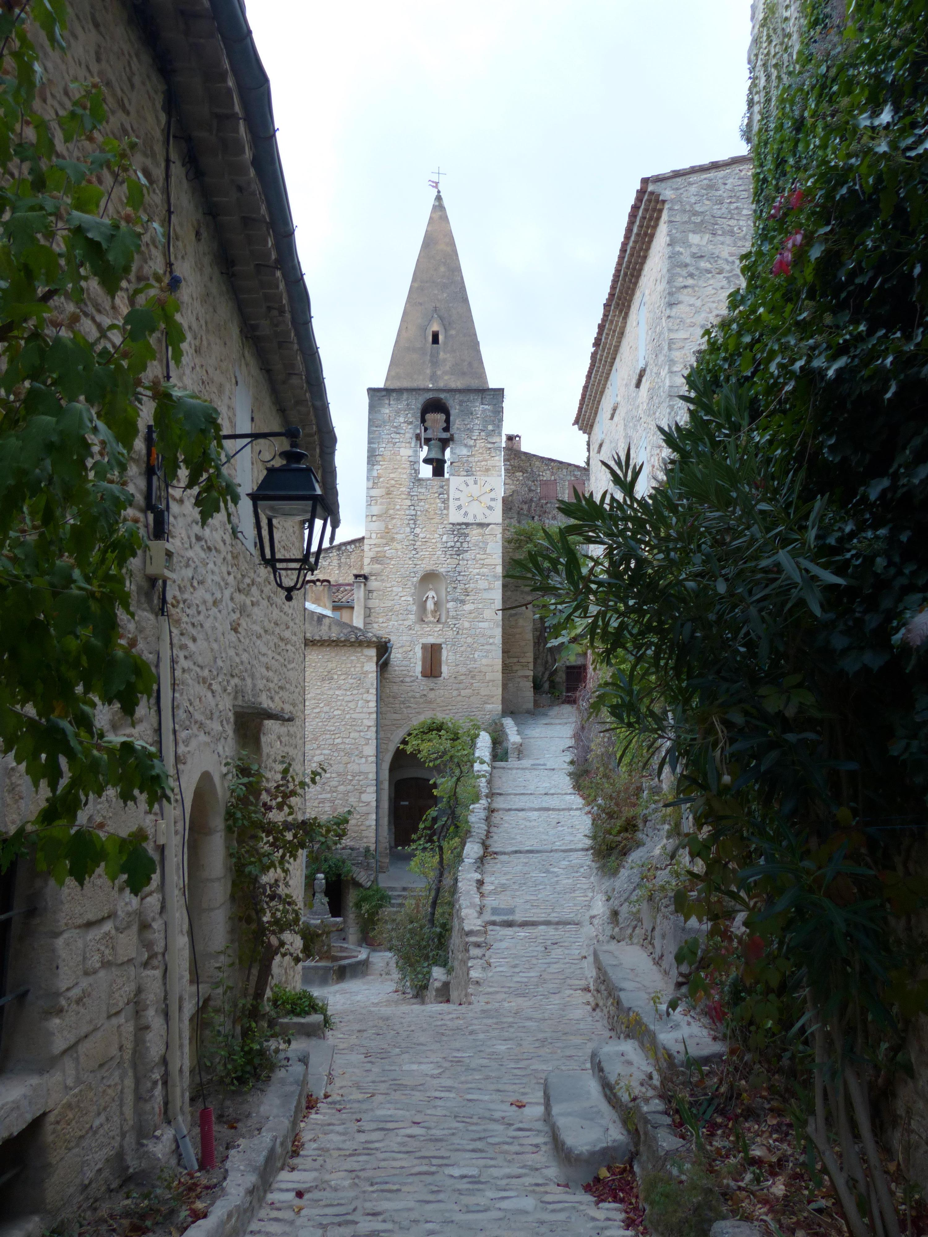 Crestet (Vaucluse). Clocher de l'église.